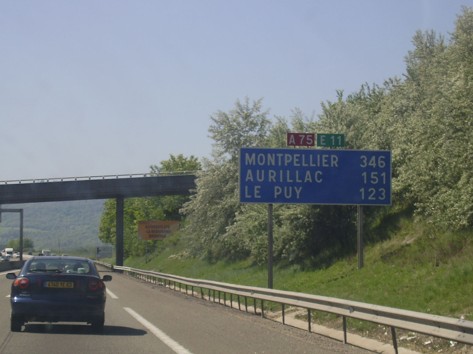 Début de l'A 75 : panneau de confirmation (Montpellier / Aurillac / Le Puy)